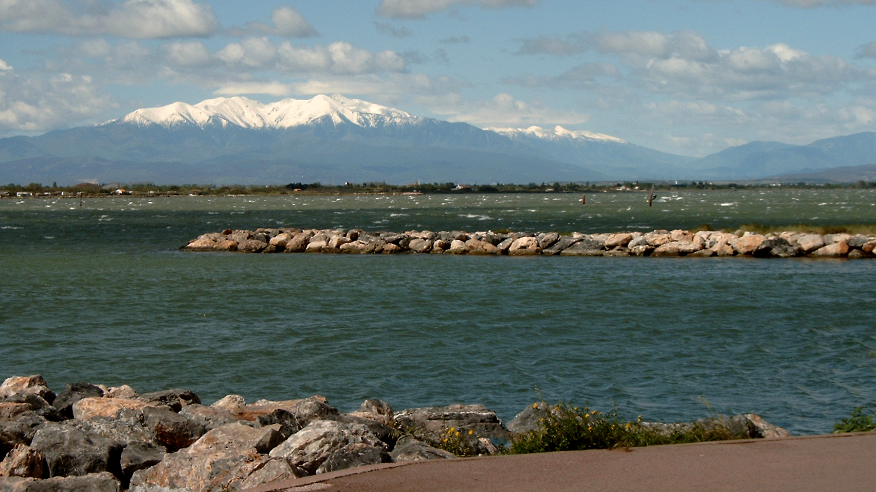 Le Barcarès (Pyrénées-Orientales, France) : Le Pic du Canigou vu depuis la résidence "Port Murano".